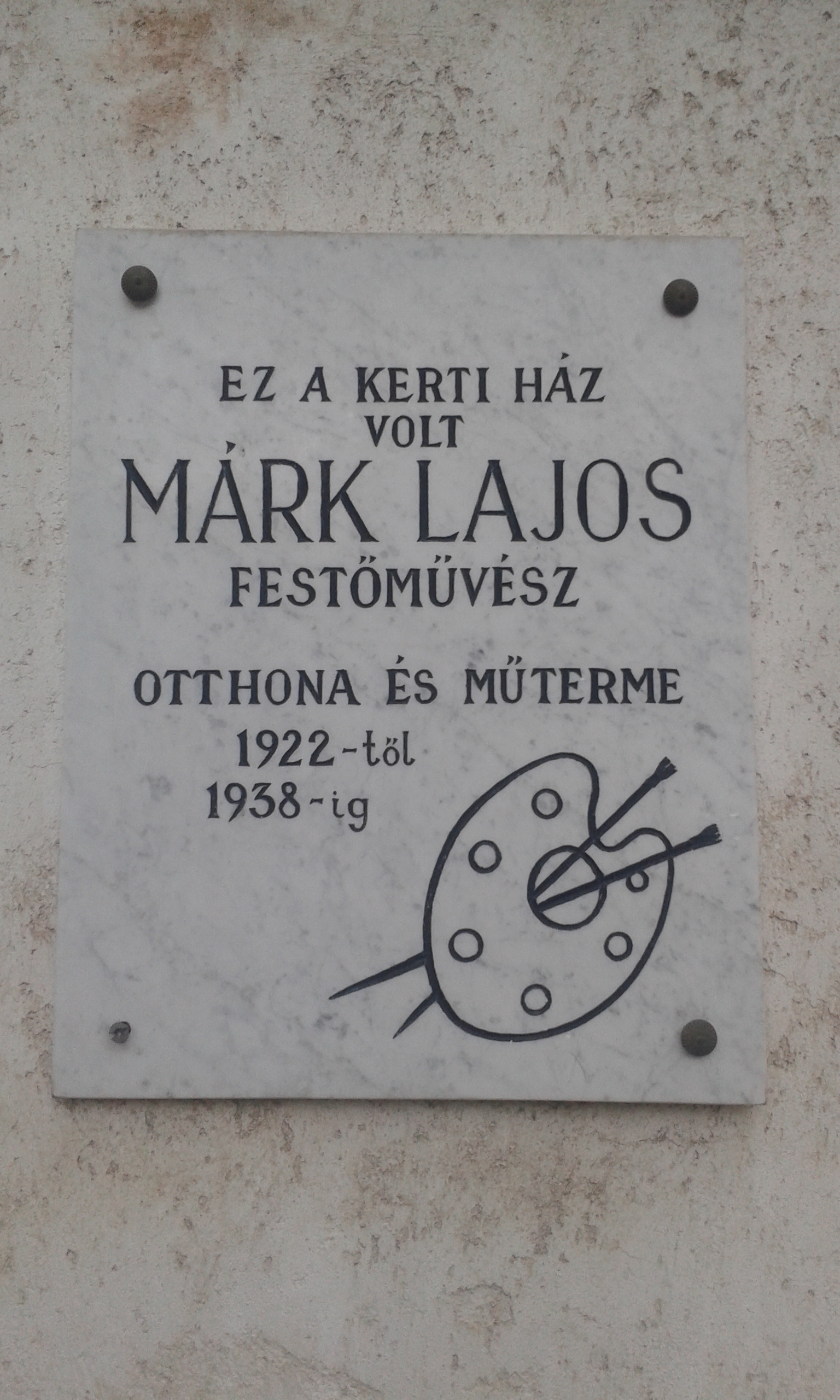 Márk Lajos festőművész emléktáblája (Budapest VI. kerület, Városligeti fasor 4-6. szám, volt műtermének épületében működő Derkovits Gyula Általános Iskola udvari épületének fala)